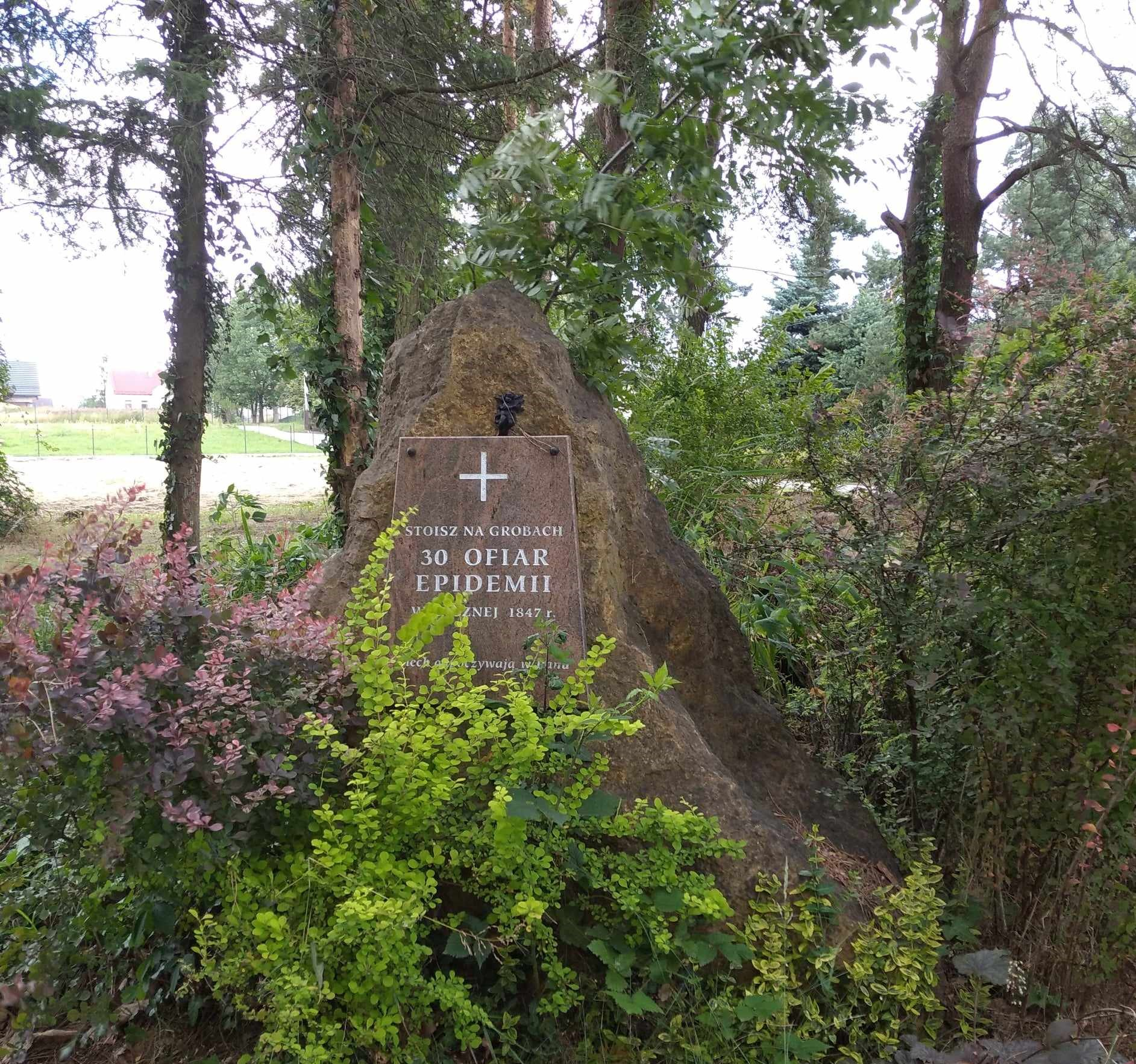 Rączna obeliski na cmentarz choleryczny